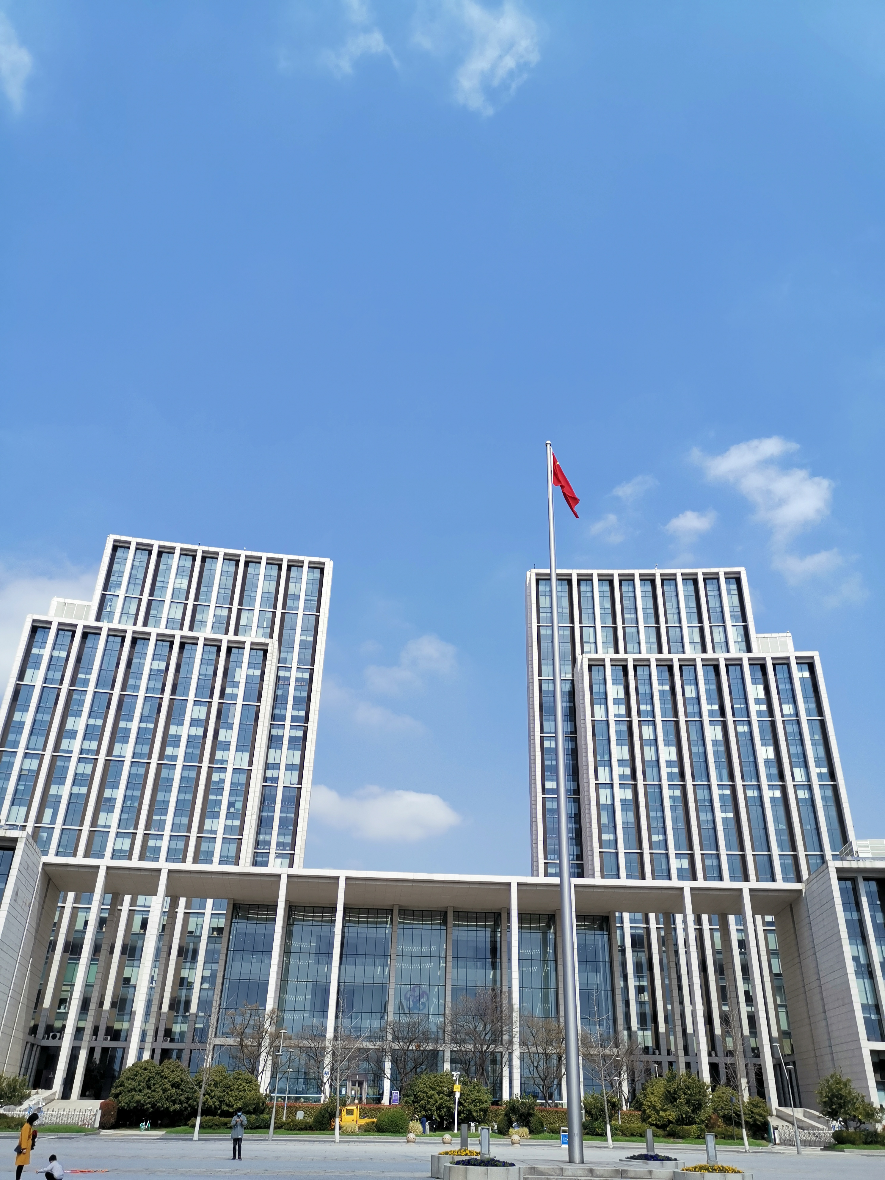 2020-3 无锡市民中心 南侧 无锡市人民政府